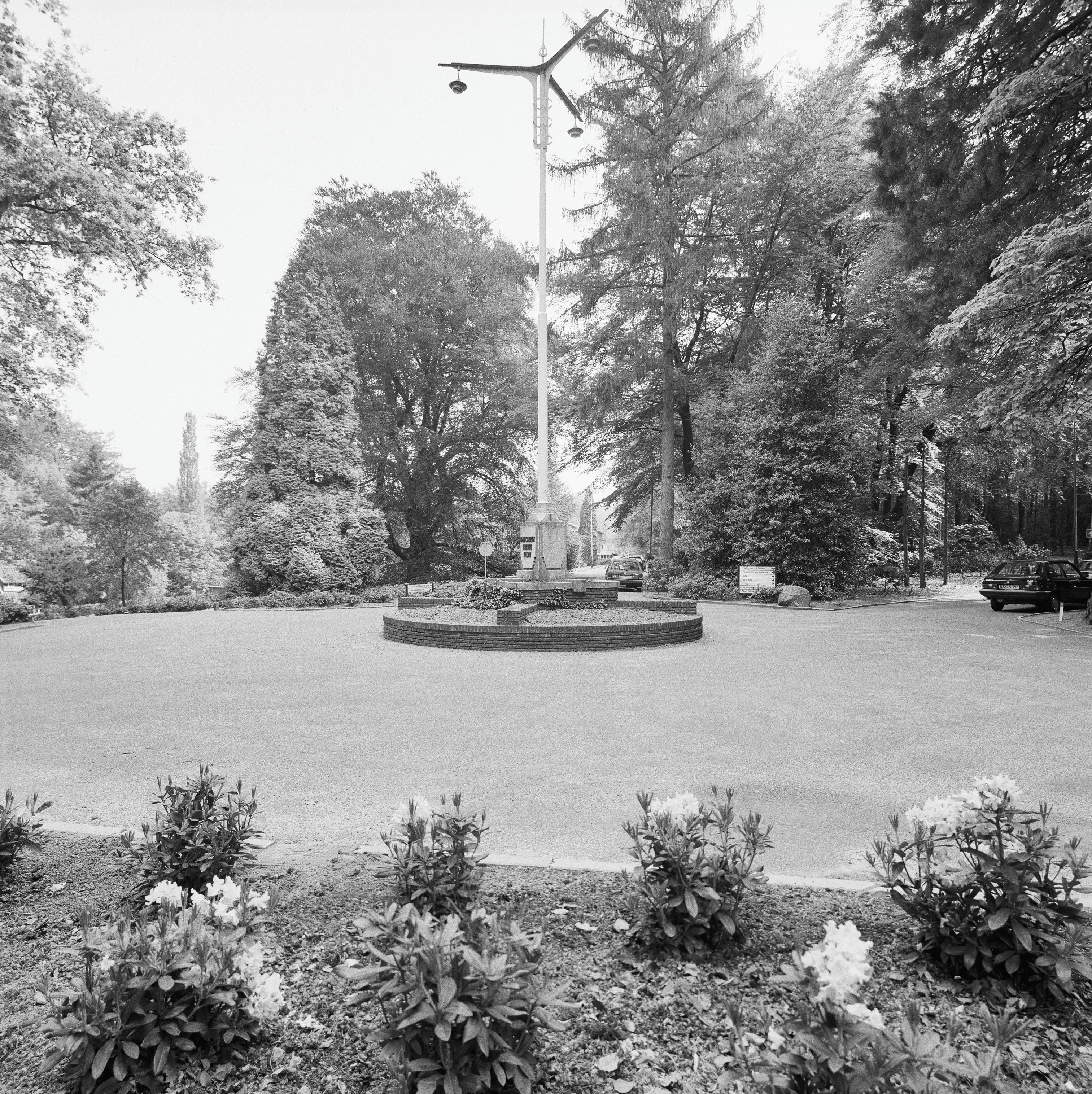 Bedrijfscomplex van de KEMA: Overzicht stalen herdenkingslichtmast of lantaarn (opmerking: Gefotografeerd voor MIP Gelderland)